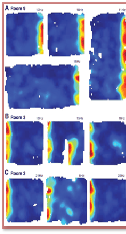 경계 세포의 전기 신호 발생